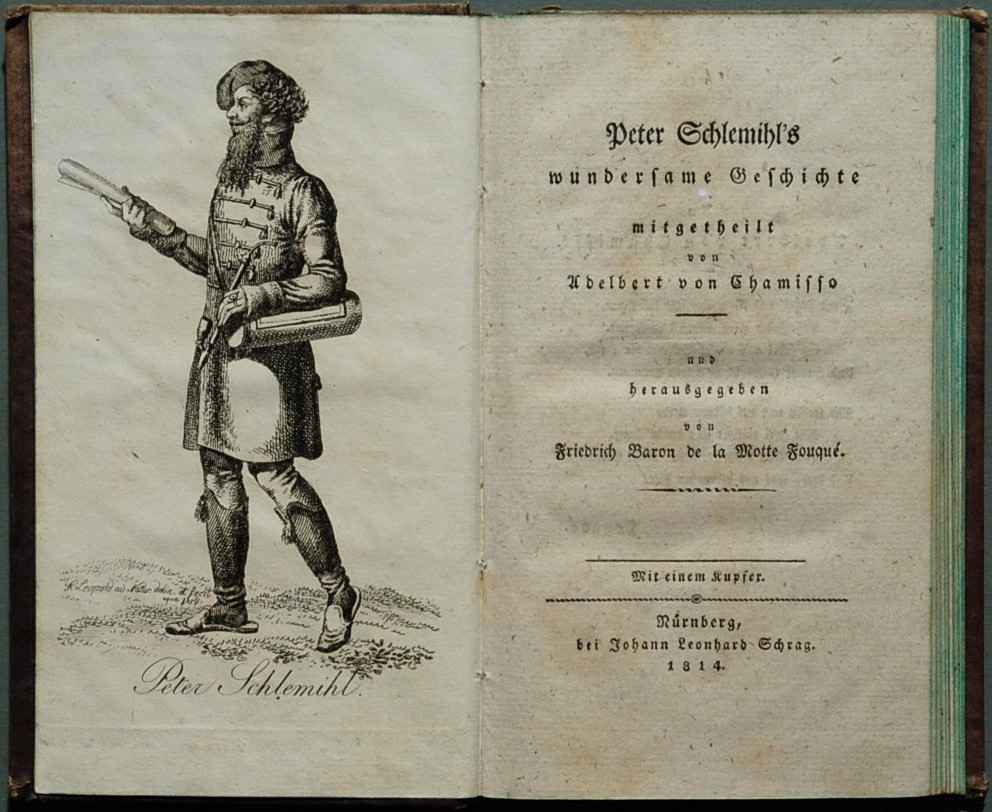 Adelbert von Chamisso: Peter Schlemihl's wundersame Geschichte, mitgetheilt von Adelbert von Chamisso und herausgegeben von Friedrich Baron de la Motte Fouqué. [Mit einem Kupfer] Nürnberg: J. L. Schrag 1814, XII Seiten + 132 Seiten. Erstausgabe/Erstdruck Wilpert/Gühring 2 Das Frontispiz wurde von Franz Joseph Leopold gestochen (1783 - 1832), Lit.: THIEME-BECKER Band 23, Seite 93